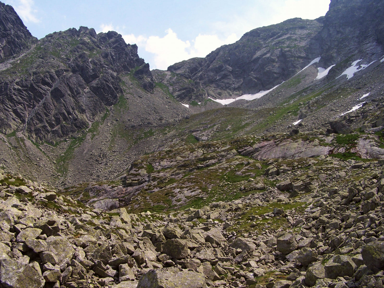 Zadnie Koło w Zielonej Dolinie Gąsienicowej w Tatrach